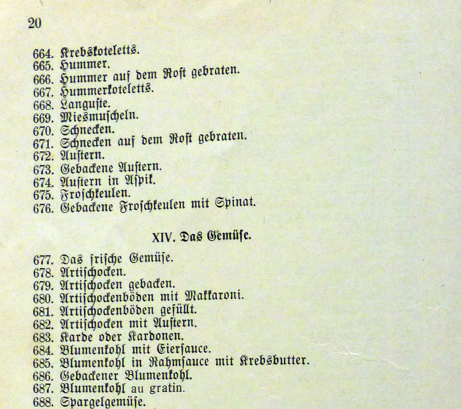 Auszug Inhaltsverzeichnis aus Das beste bürgerliche Kochbuch von Emma Allestein, 33. Auflage, 1930